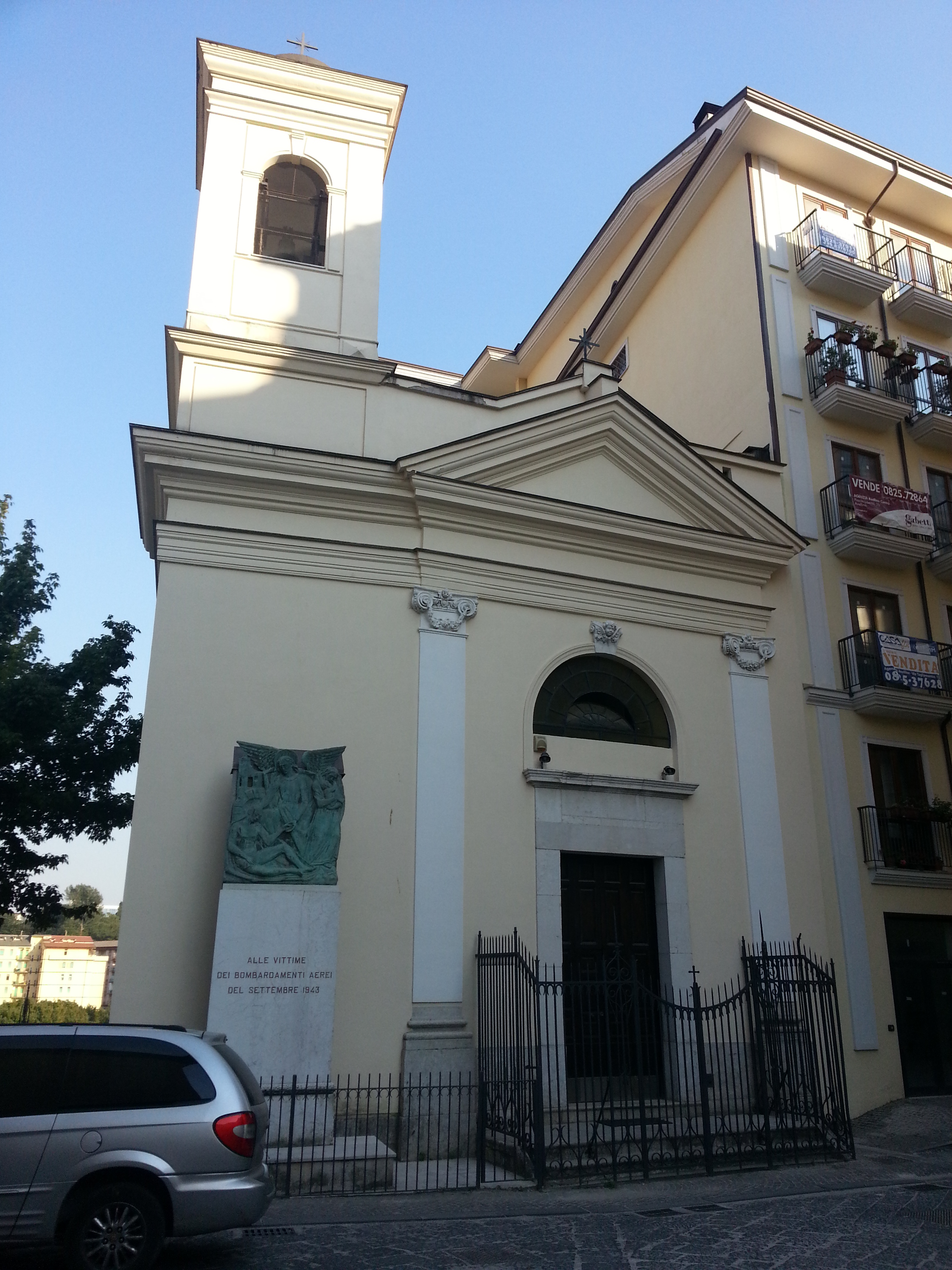 Facciata della chiesa di Santa Maria del Rifugio (detta di Sant'Anna) Avellino